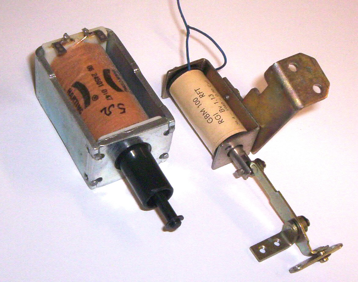 Zugmagnete